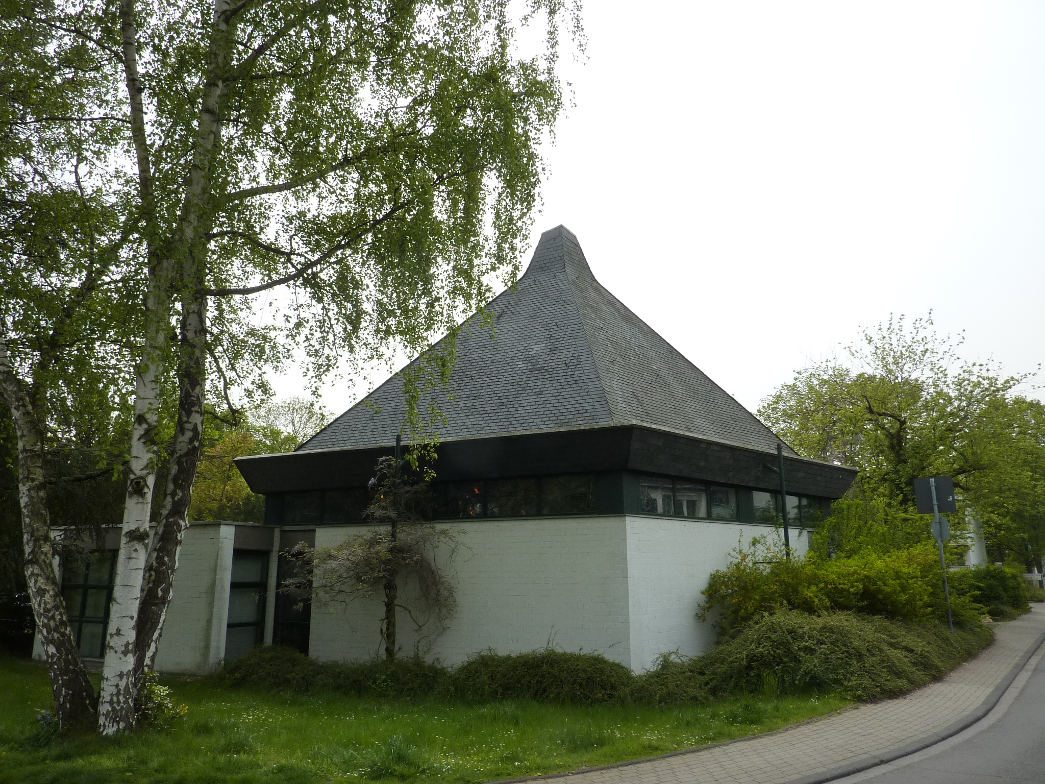 Dietrich-Bonhoeffer-Kirche (Köln-Lindenthal)